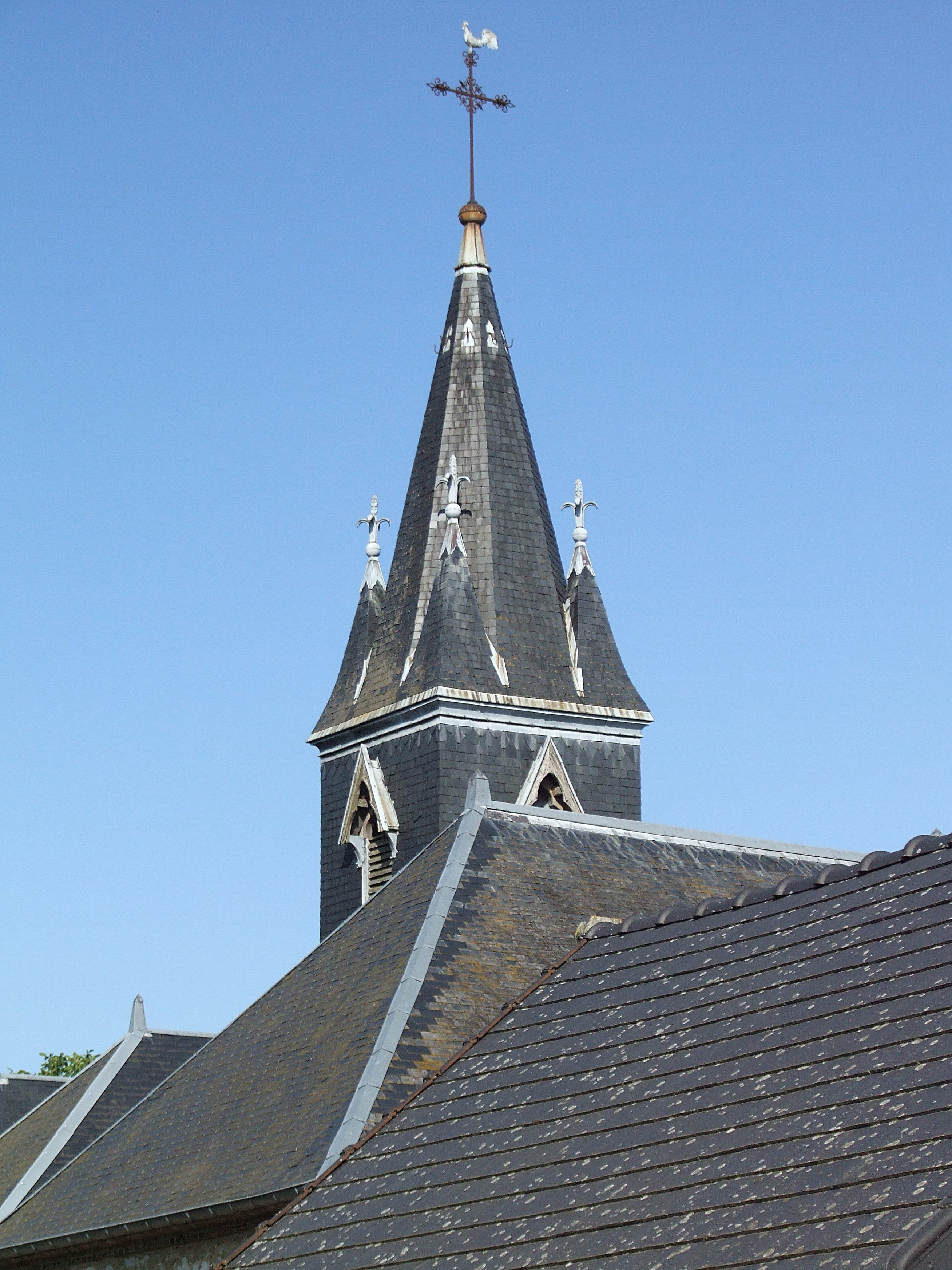 Église de Givry-lès-Loisy